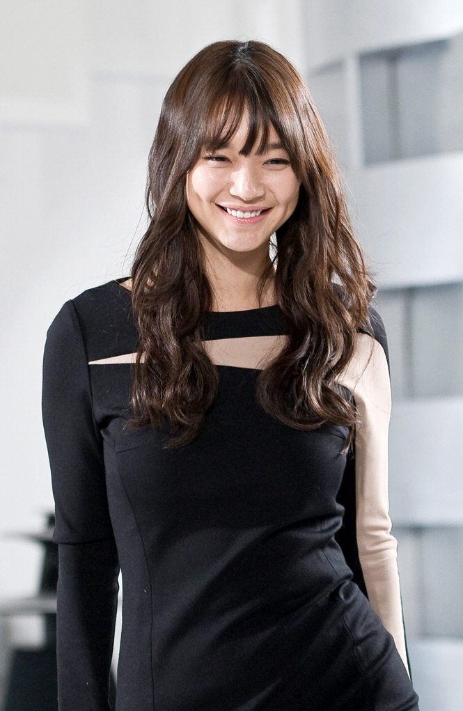 LG XNOTE 신민아 송중기 TV 광고 촬영 사진 콤팩트한 사이즈에 파워플한 성능까지 Always Amazing